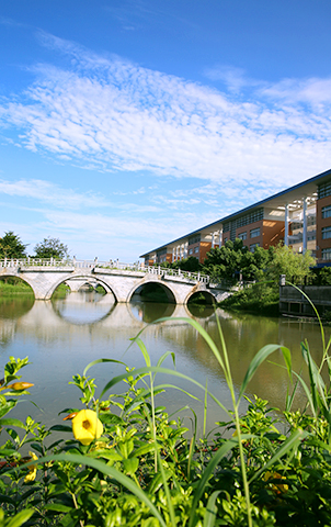 中文（中国大陆）: 广外南校区